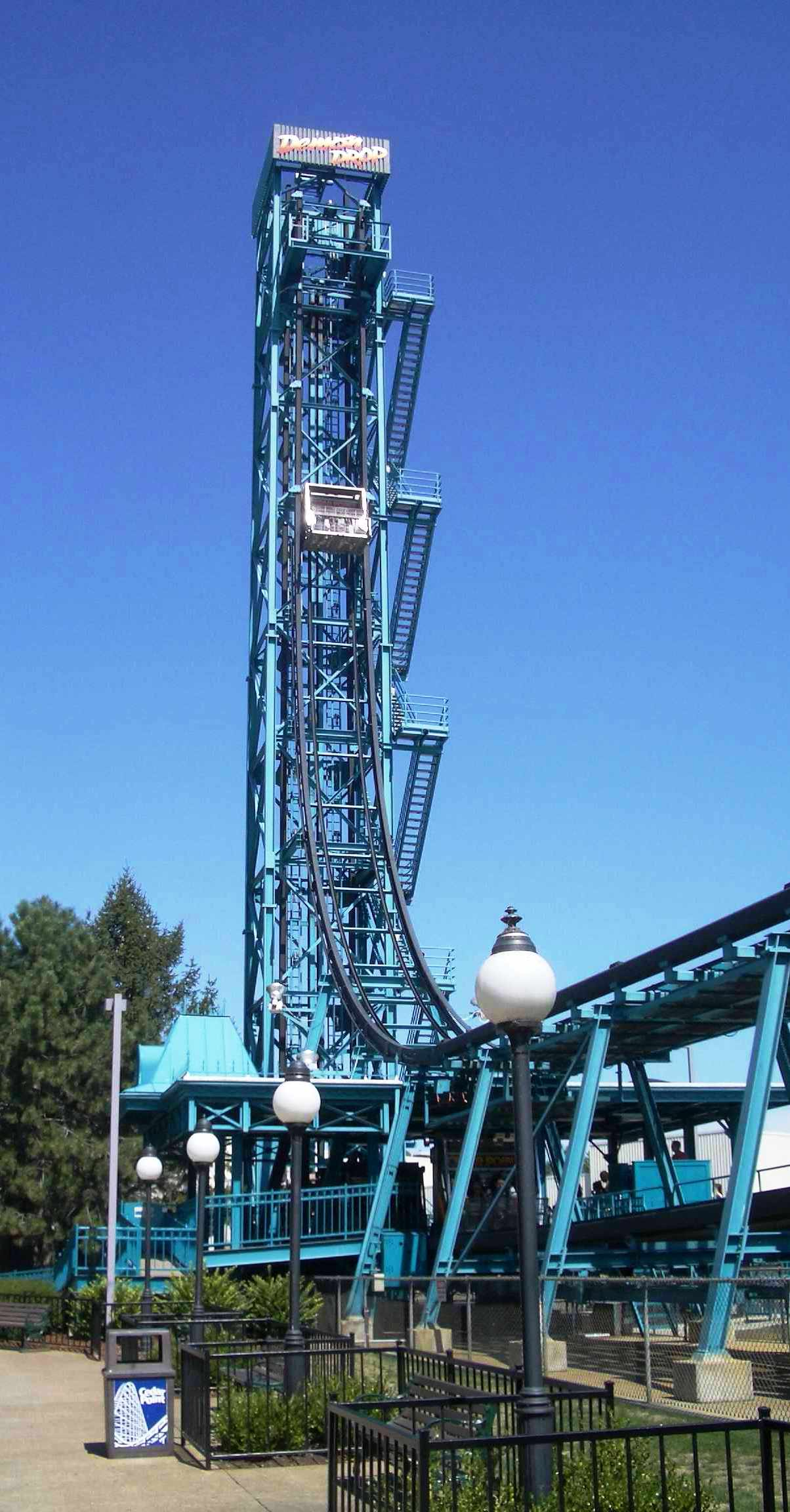 Vista de la atracción Demon Drop, una free fall